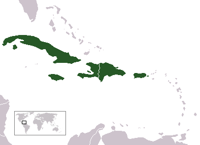 Antillas Mayores o Grandes Antillas Map over the Antilles, with the Greater Antilles marked in dark green. (Edited version of LocationLesserAntilles.png.)